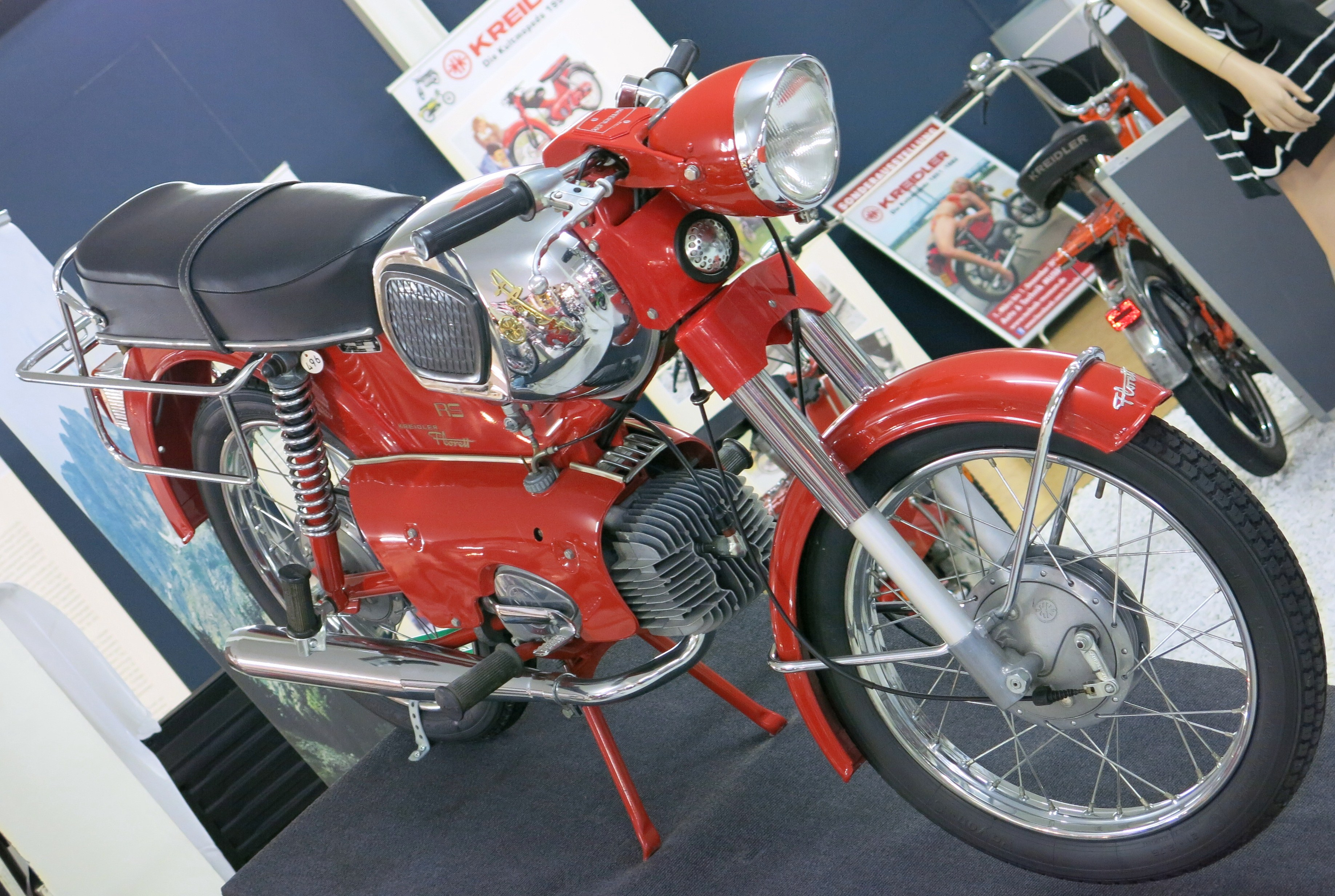 Kleinkraftrad Kreidler Florett RS, Baujahr 1970